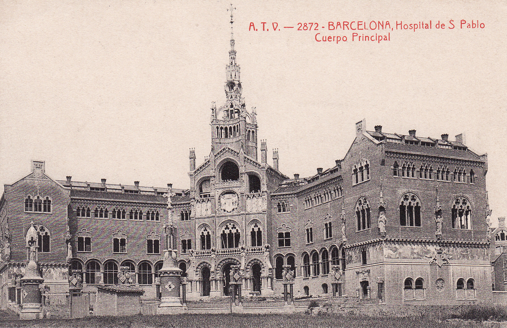 Hospital de Sant Pau en construcció